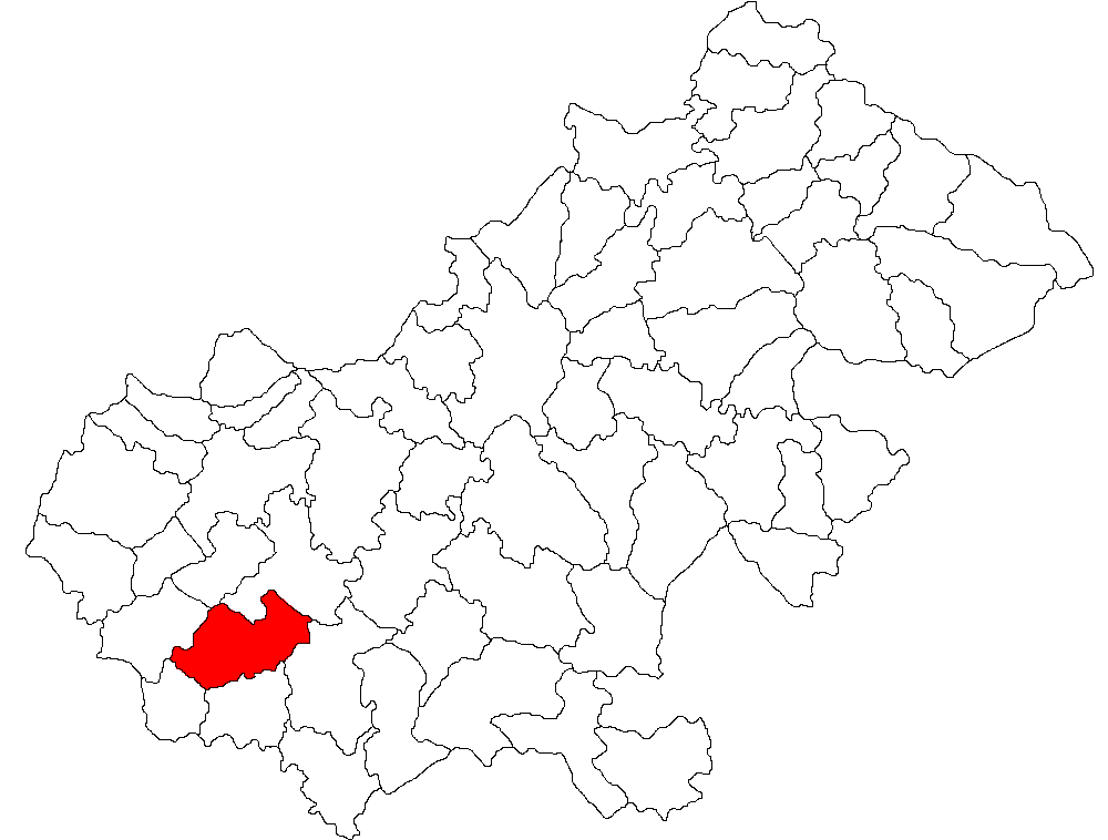 Categorie:Hărţi ale judeţului Satu Mare